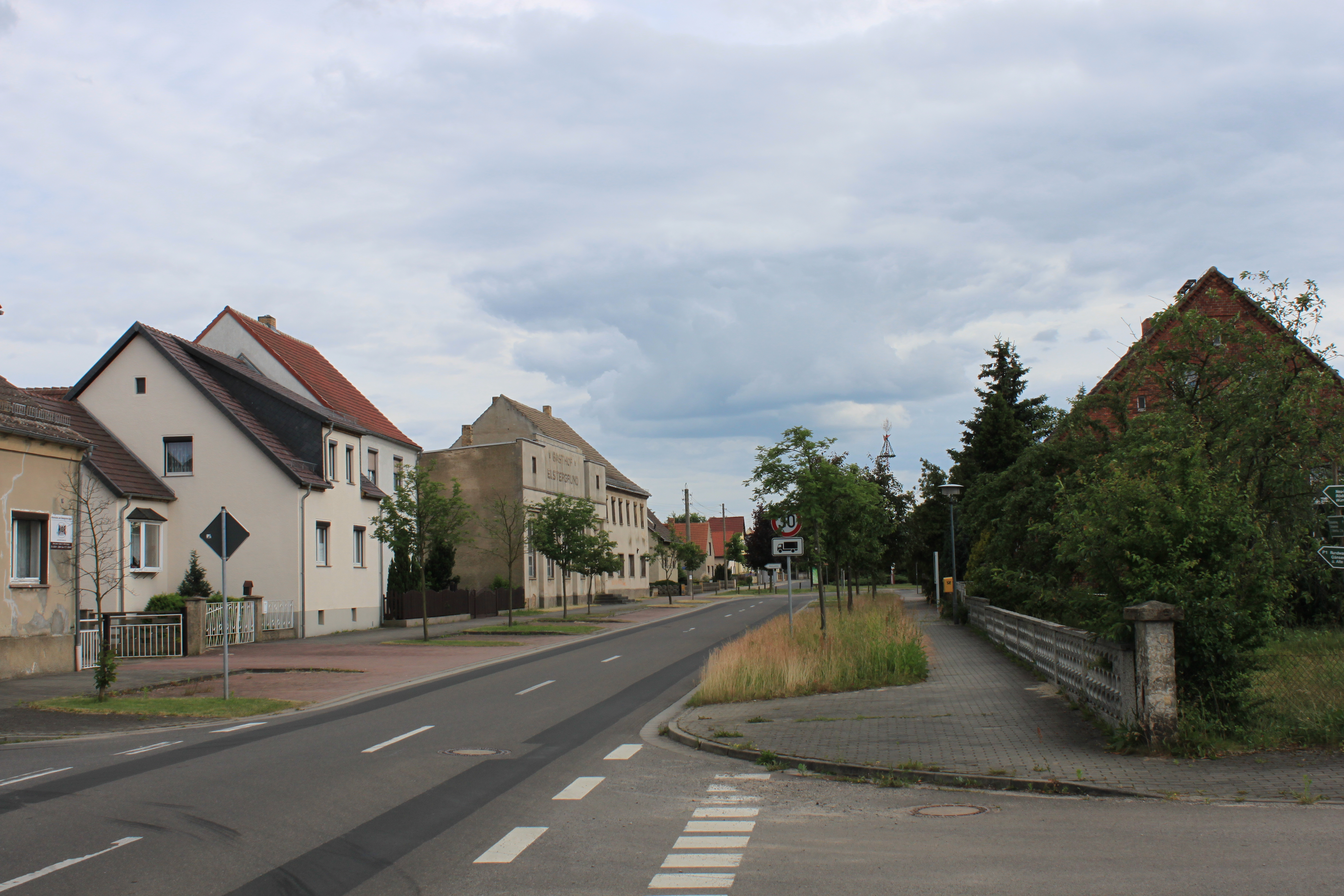 Prieschka